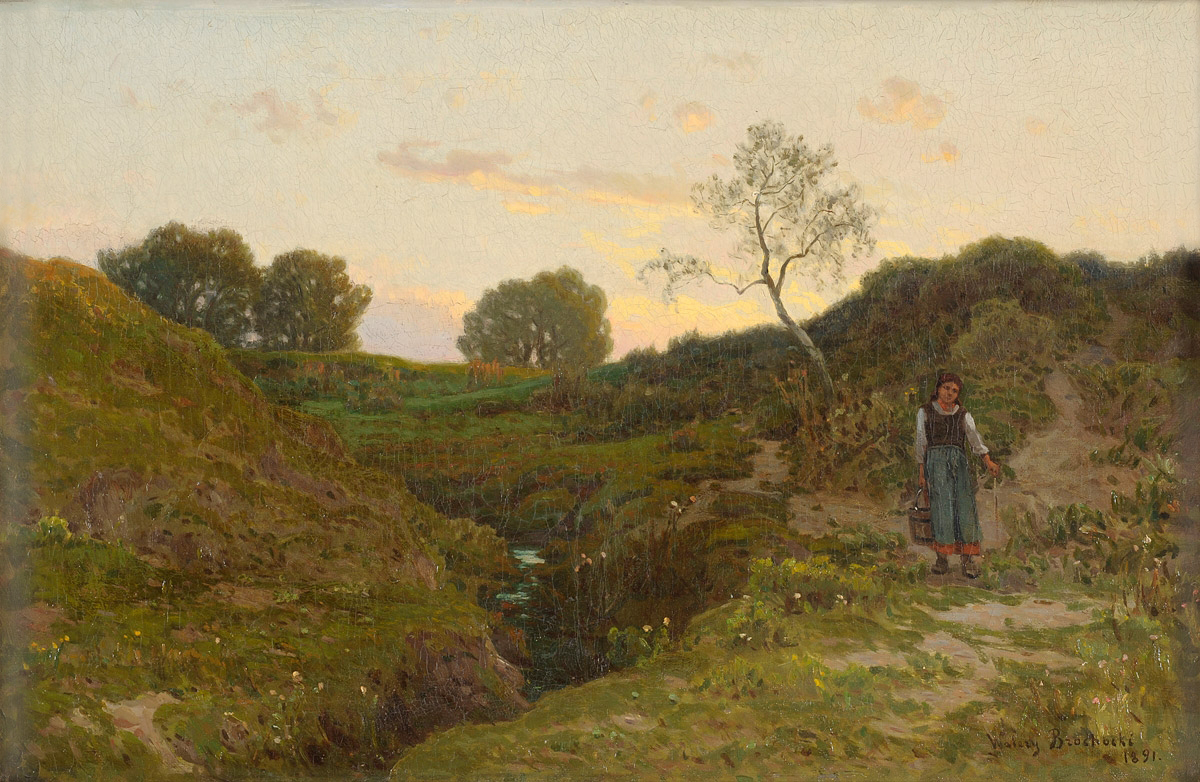 Kobieta niosąca wodę